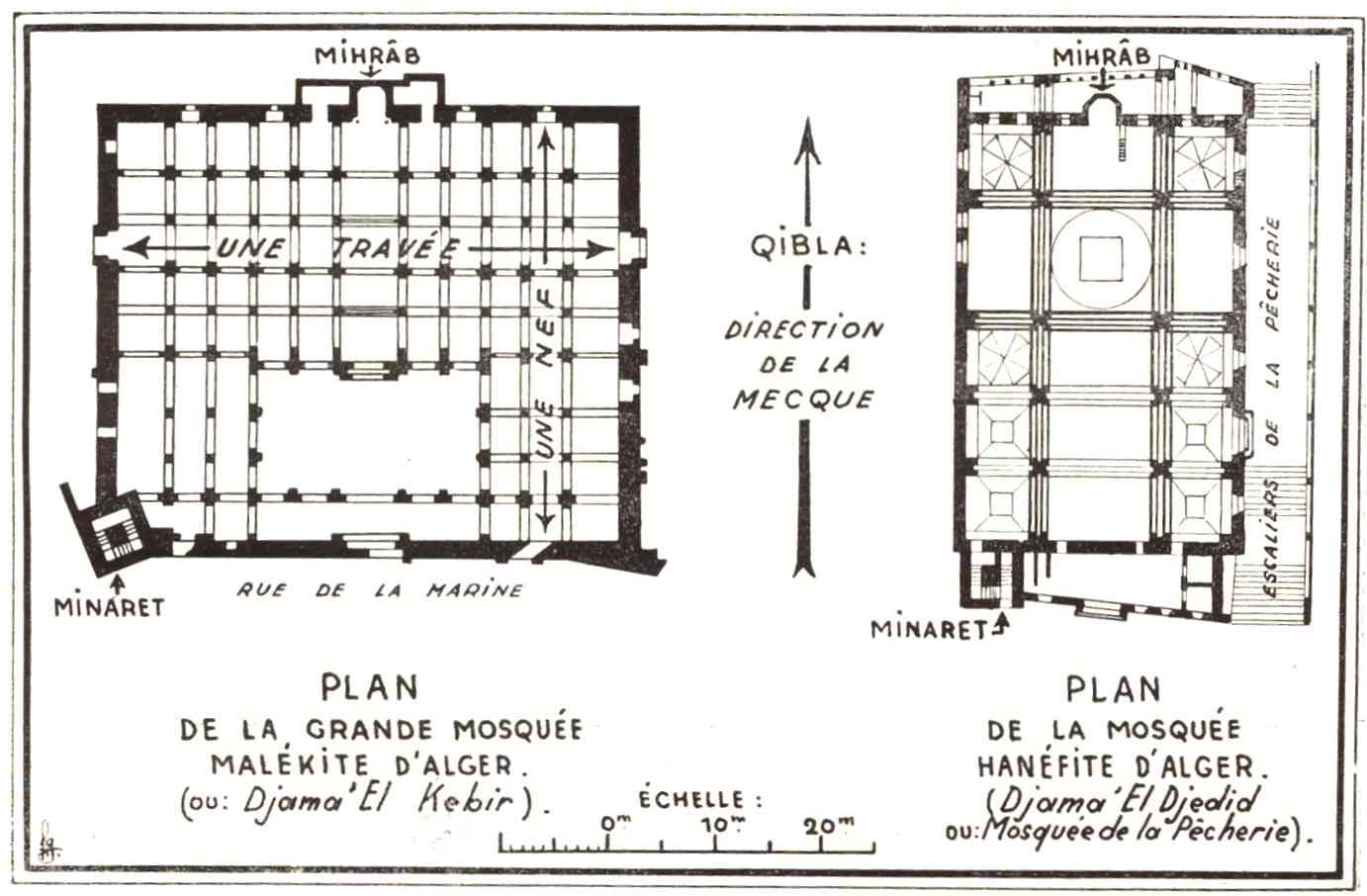 Plan comparés de Djamaa el Kebir (XIe siècle) et de Djamaa el Jdid (XVIIe siècle)